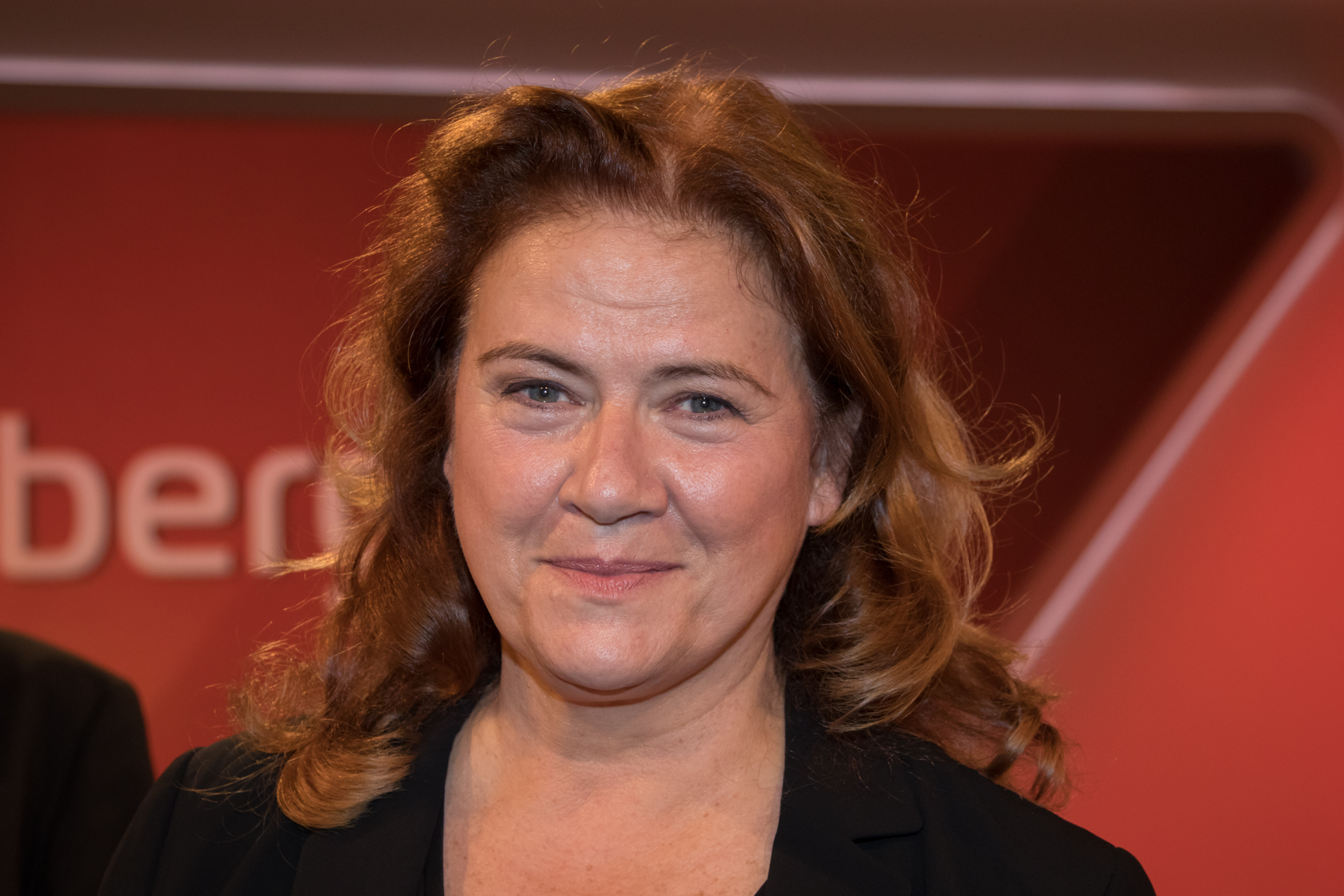 Jutta Ditfurth in der WDR-Sendung "Maischberger" am 12.07.2017